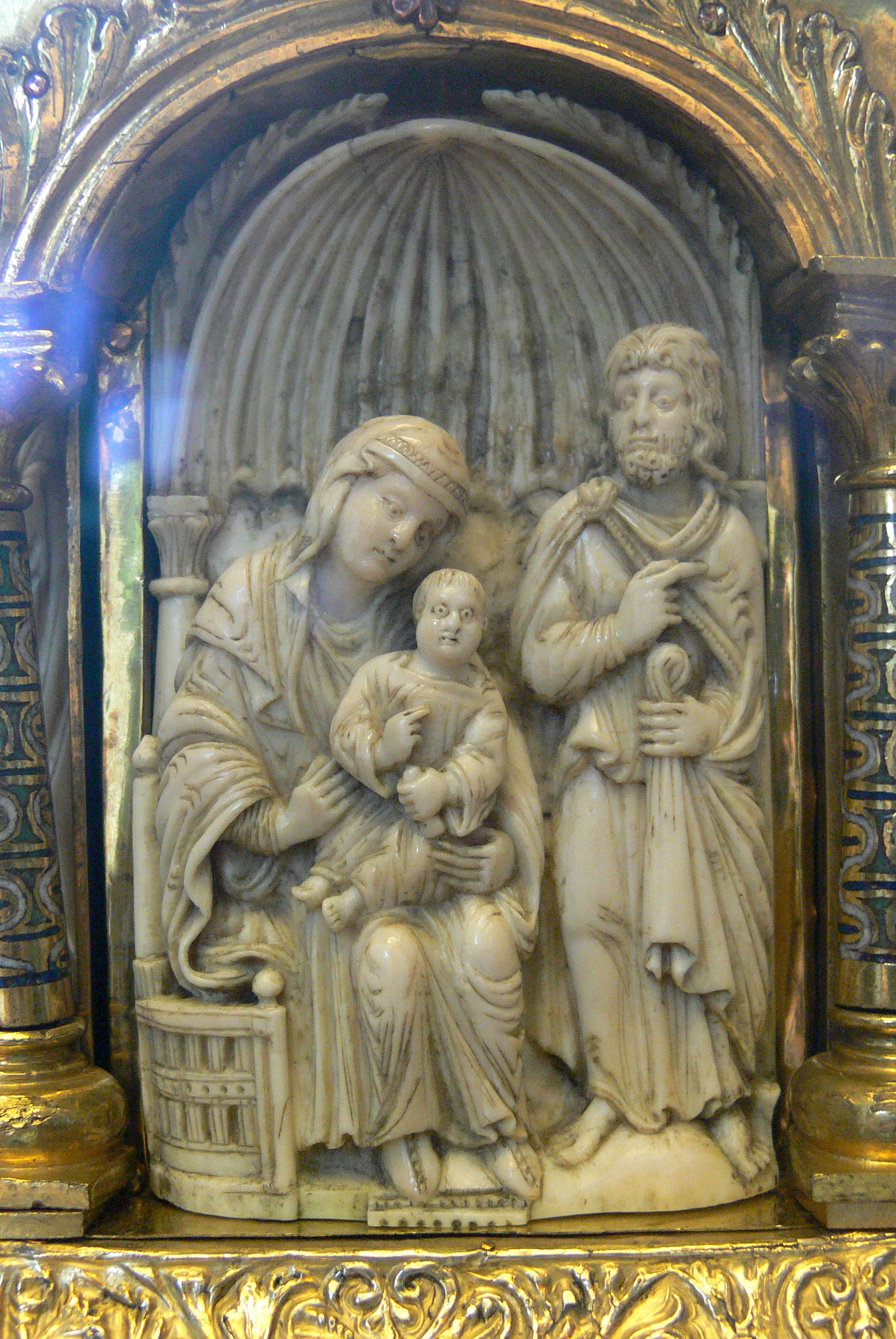 Kuppelreliquiar aus dem Welfenschatz, Köln, Ende 12. Jh.; Kunstgewerbemuseum Berlin Relief Heilige Familie